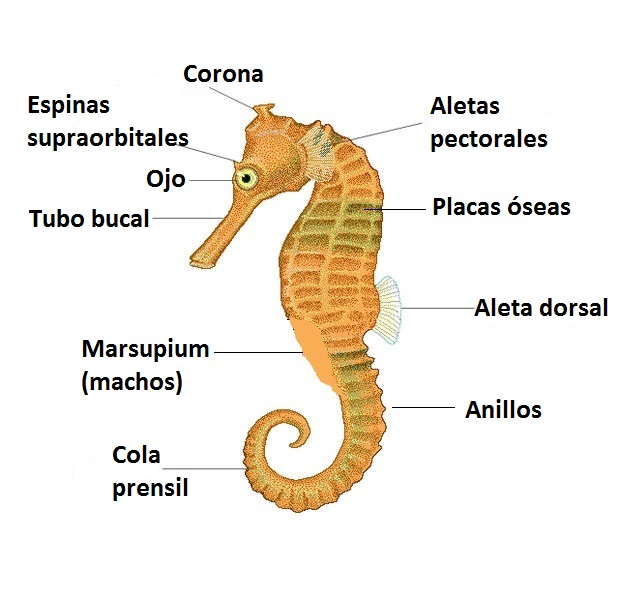 Caballito de mar. Anatomía, versión del archivo Seahorse- anatomy ita.jpg de Commons